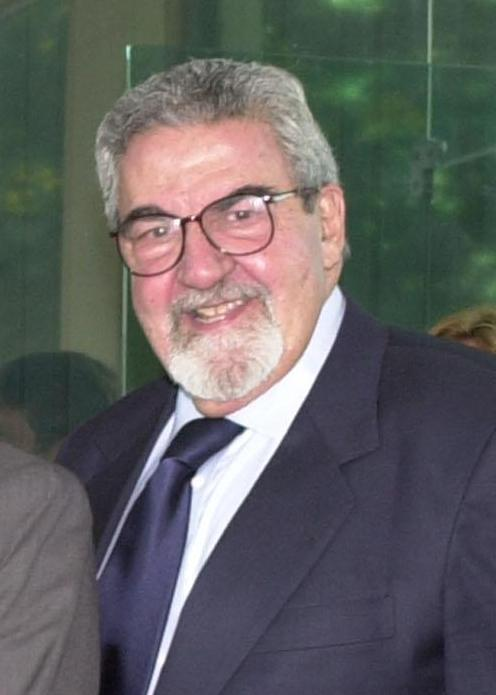 41cb3c64e2e58 Brasília - E/D: Governadores, da Bahia, Paulo Souto, do Mato Grosso, Blairo Maggi, de São Paulo, Geraldo Alckmin, do Pará, Simão Jatene, ministro da Fazenda, Antônio Palocci, governador do Rio Grande do Sul, Germano Rigotto, e o vice-governador do Rio de Janeiro, Luiz Paulo Conde, durante discussão dos recursos orçamentários que compõem o Fundo de Compensação dos Estados Exportadores, no Ministério da Fazenda. Foto: J. Freitas/ABr.